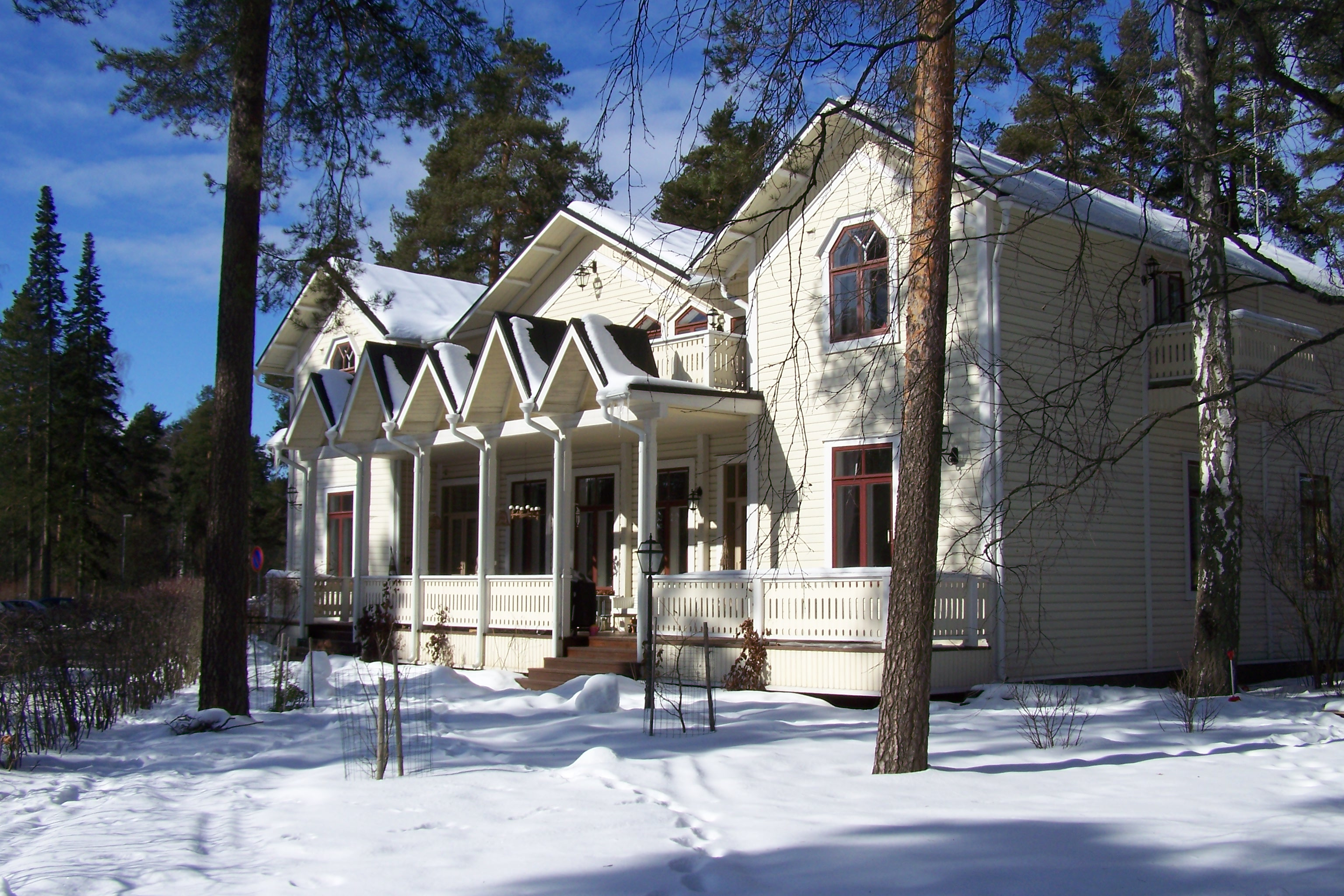 Vita Villan (Valkoinen huvila), arkkitehti Magnus Schjerfbeckin piirtämä puuhuvila Hyvinkään parantolan perustamisvuodelta 1896.